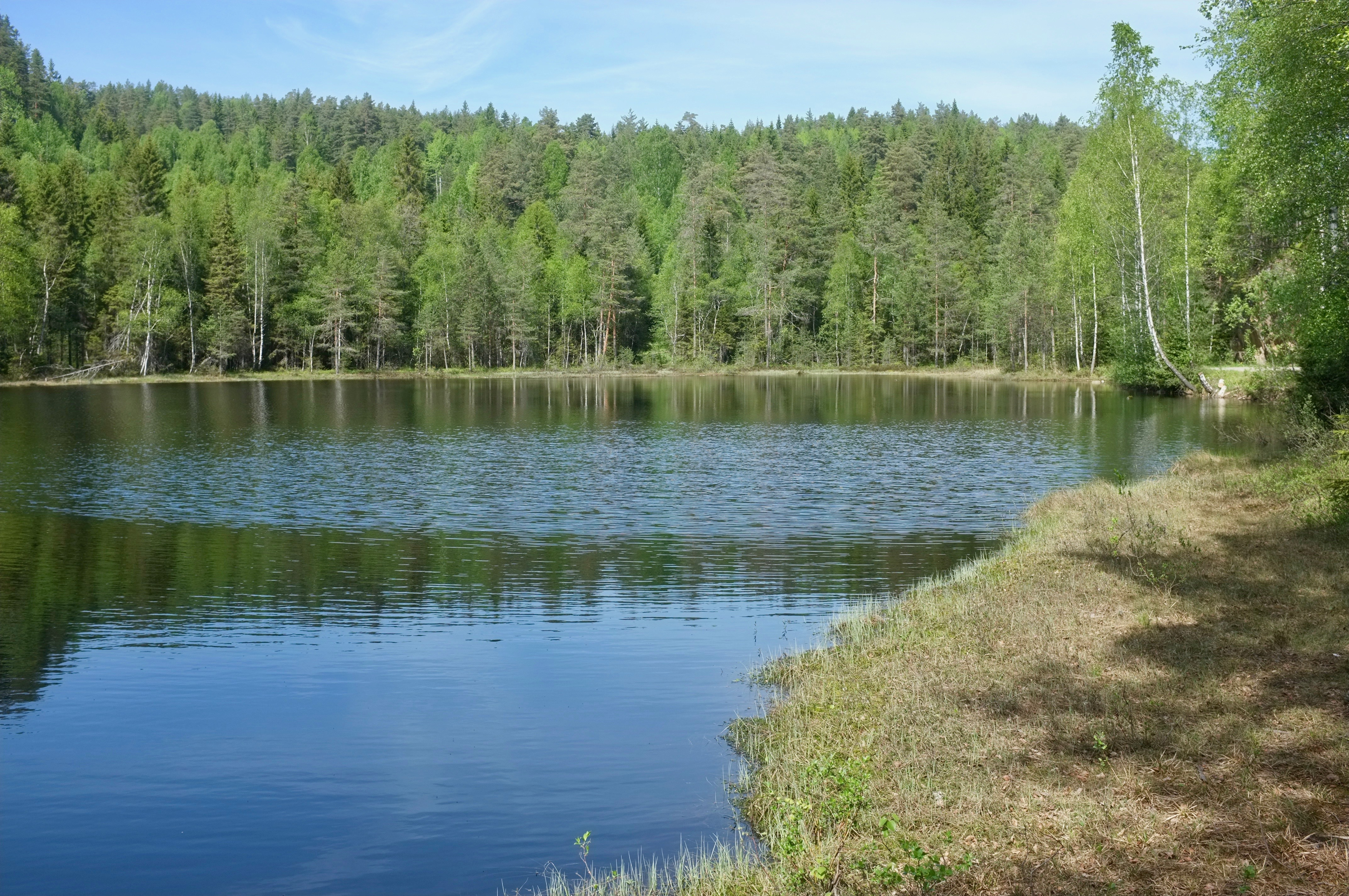 Mariholtputten, et lite vann i Østmarka i Oslo.